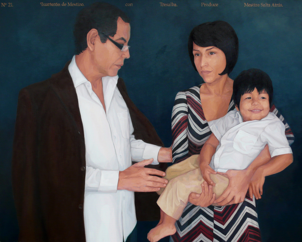 "De castas y mala raza", obra de la artista peruana Claudia Coca con la cual ganó el segundo lugar de la competencia del Banco Central de Reserva en el 2009.